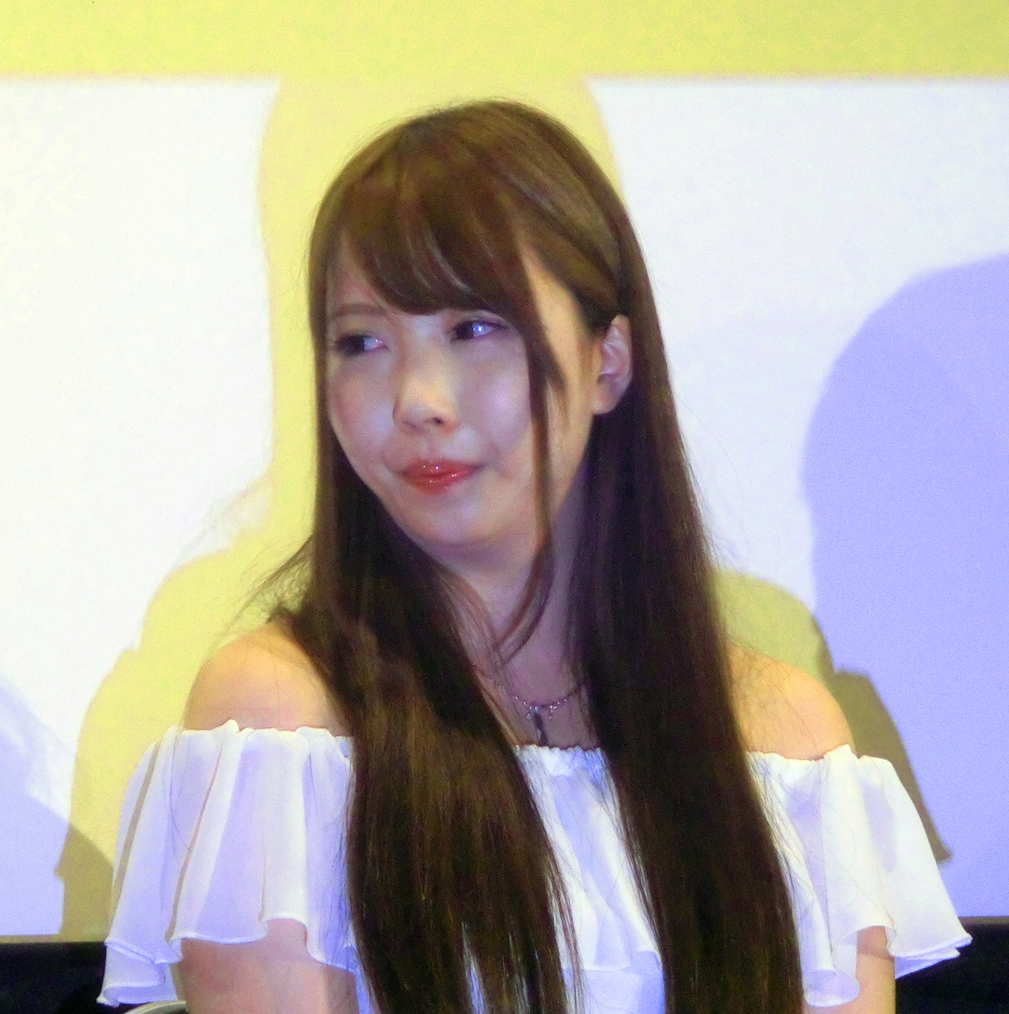 上野オークラ劇場2019年8月11日舞台挨拶